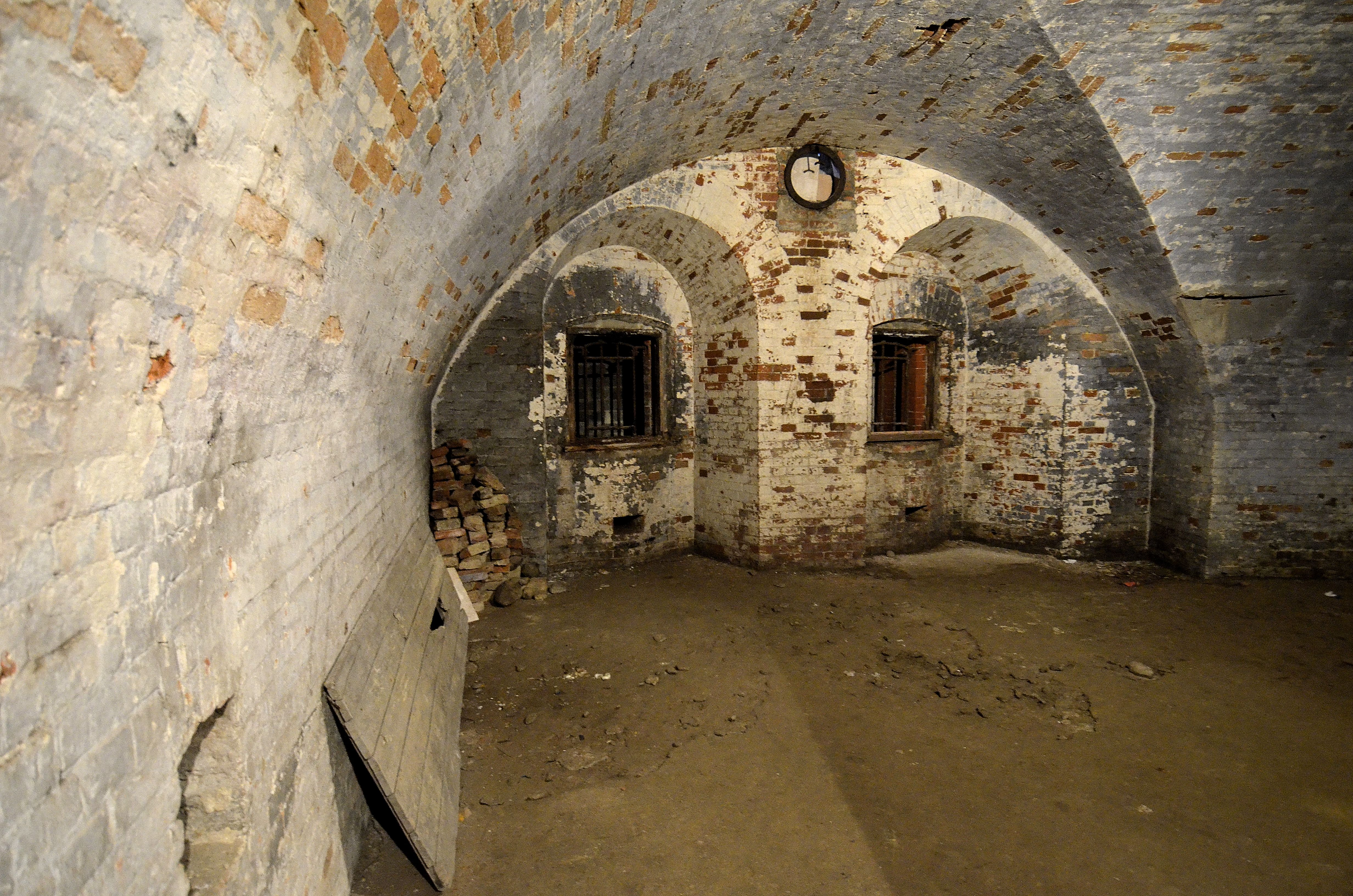 Podziemia Fortu Legionów (d. Władymira) Cytadeli Warszawskiej